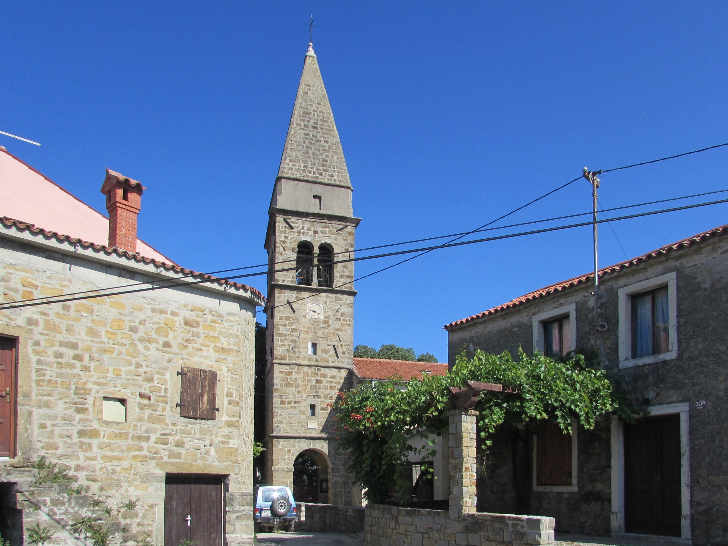 die kirche sv. blaza (st. blasius) in padna in slowenien